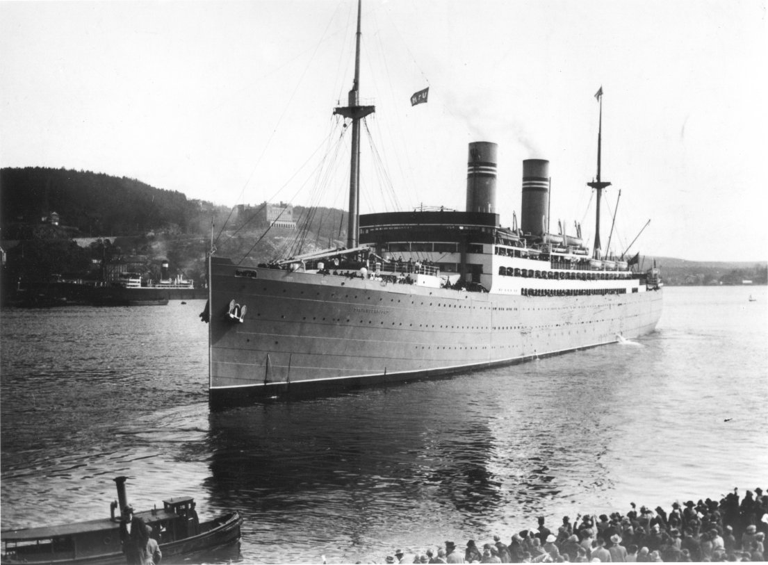 DS Stavangerfjord skip